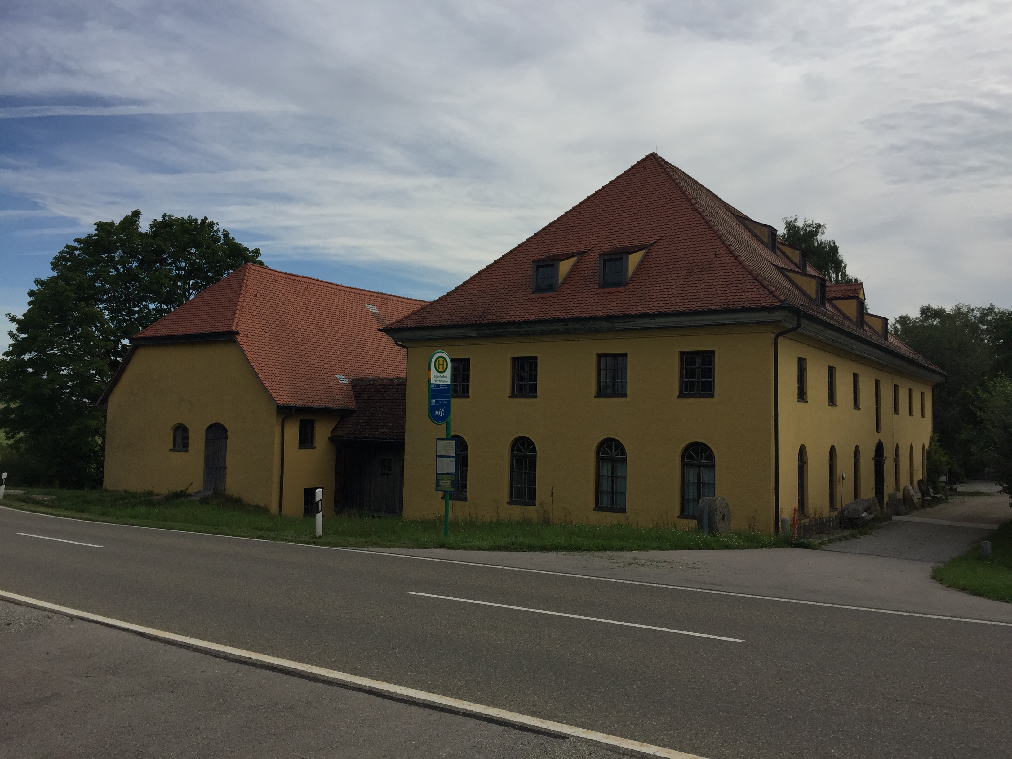 Bild der Furthmühle Egenhofen